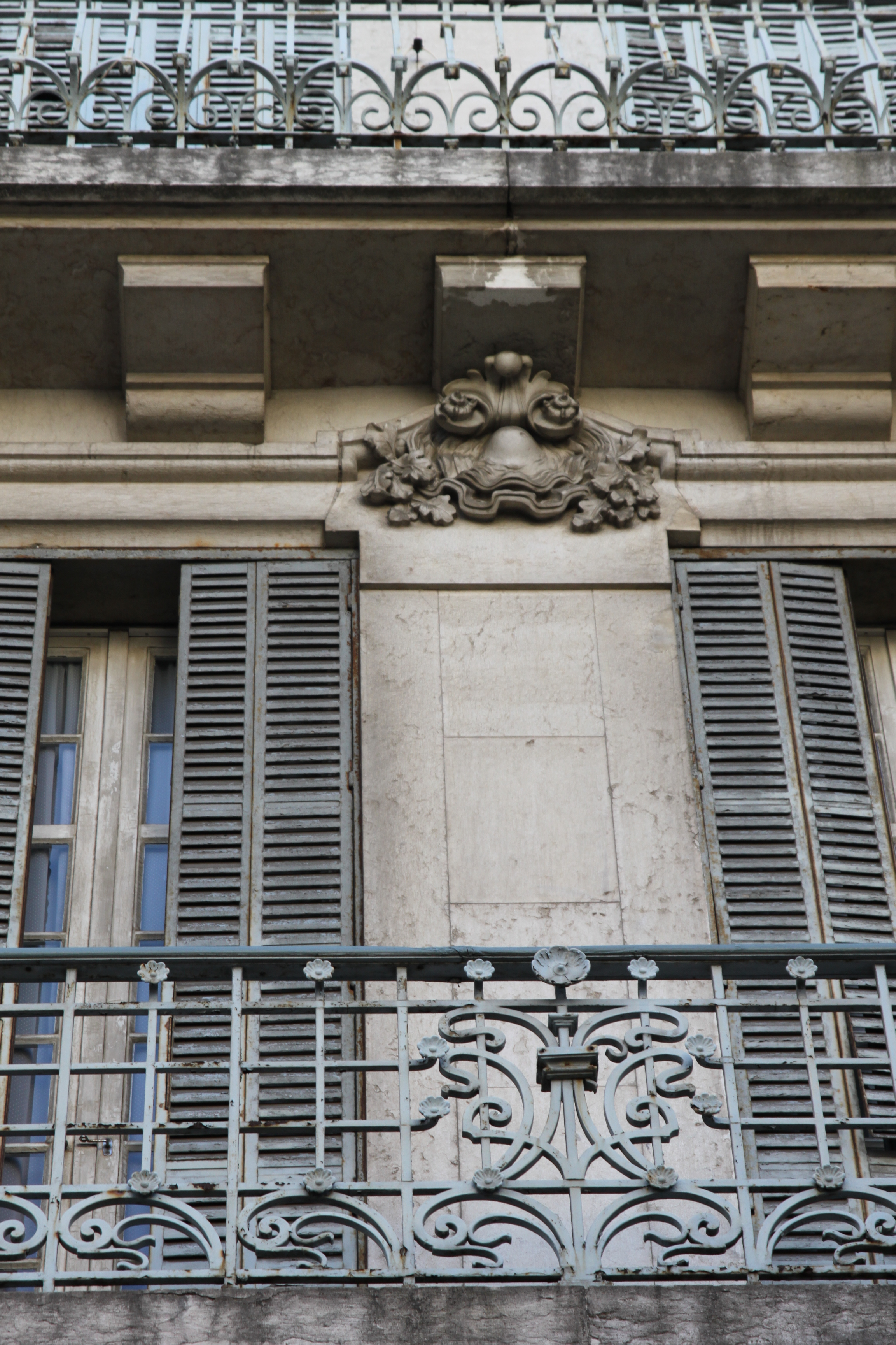 Edifício de Miguel Ventura Terra, na Rua Alexandre Herculano, nº57 This file was uploaded for Wiki Loves Monuments in Portugal with the unique identifier 71065.